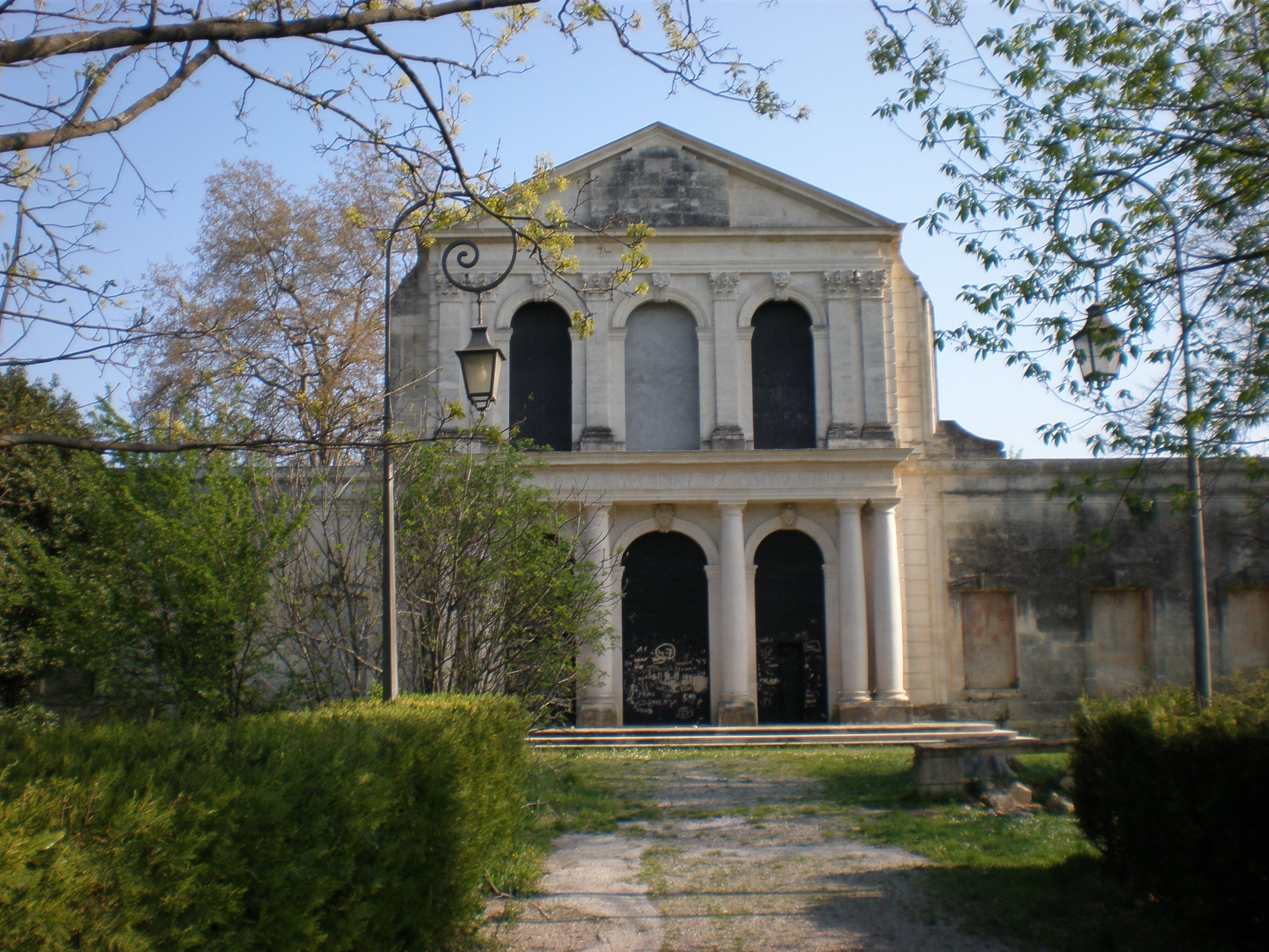 Le Château de la Mosson à Montpellier (Hérault - 34)